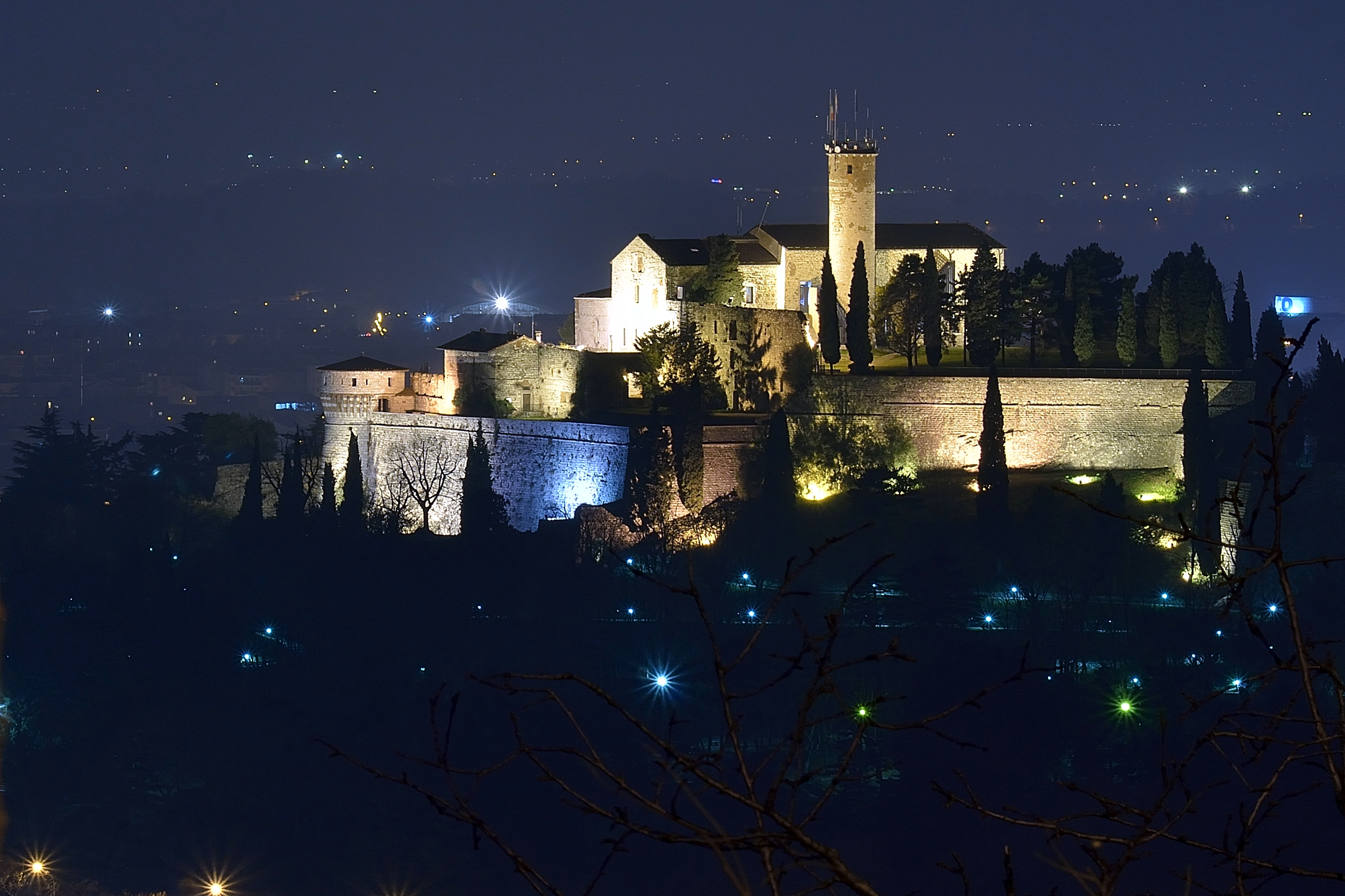 Castello di Brescia